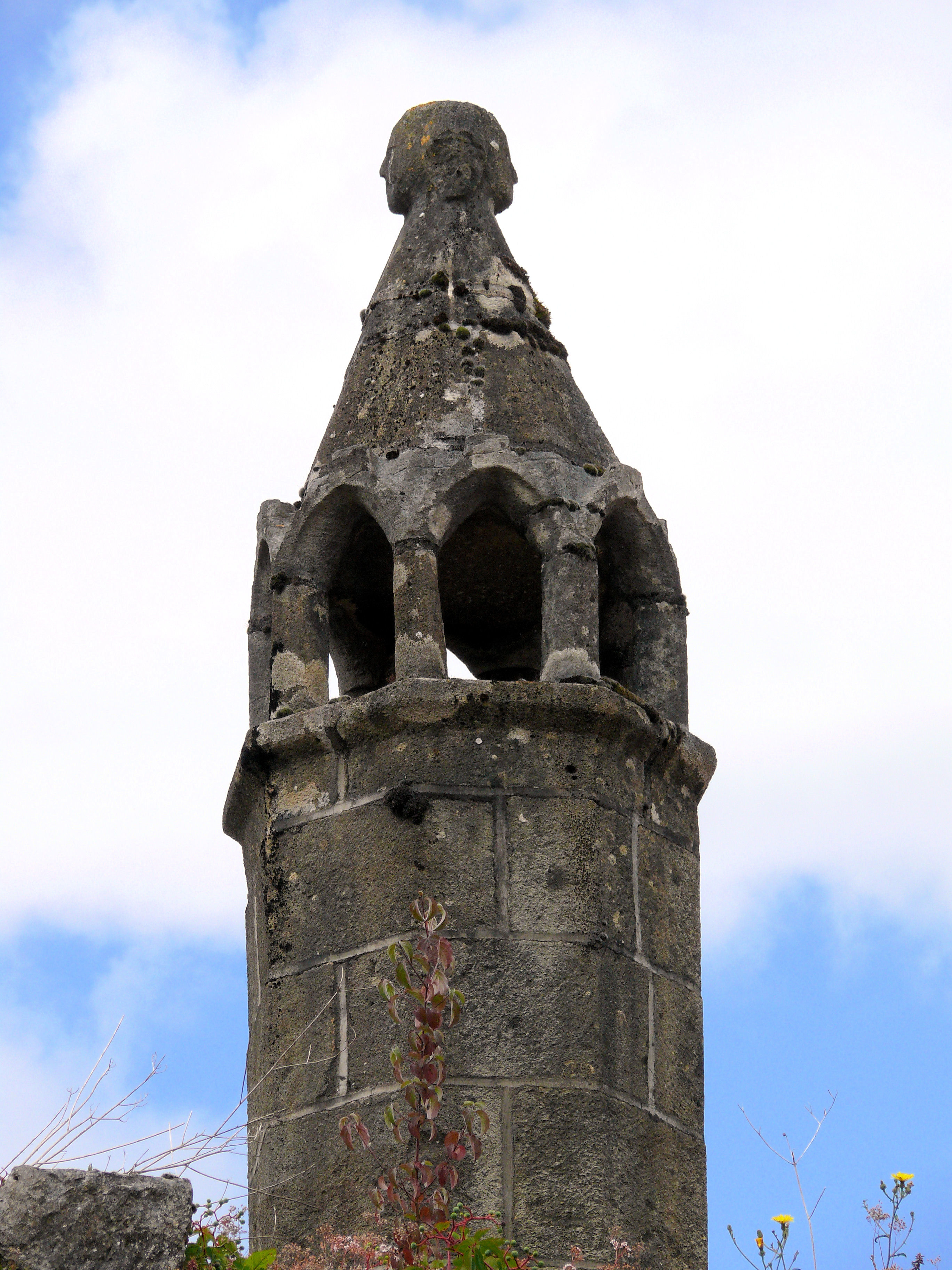 La Masse, dans la commune des Junies - Souche et mitre de cheminée datant du XIVe siècle